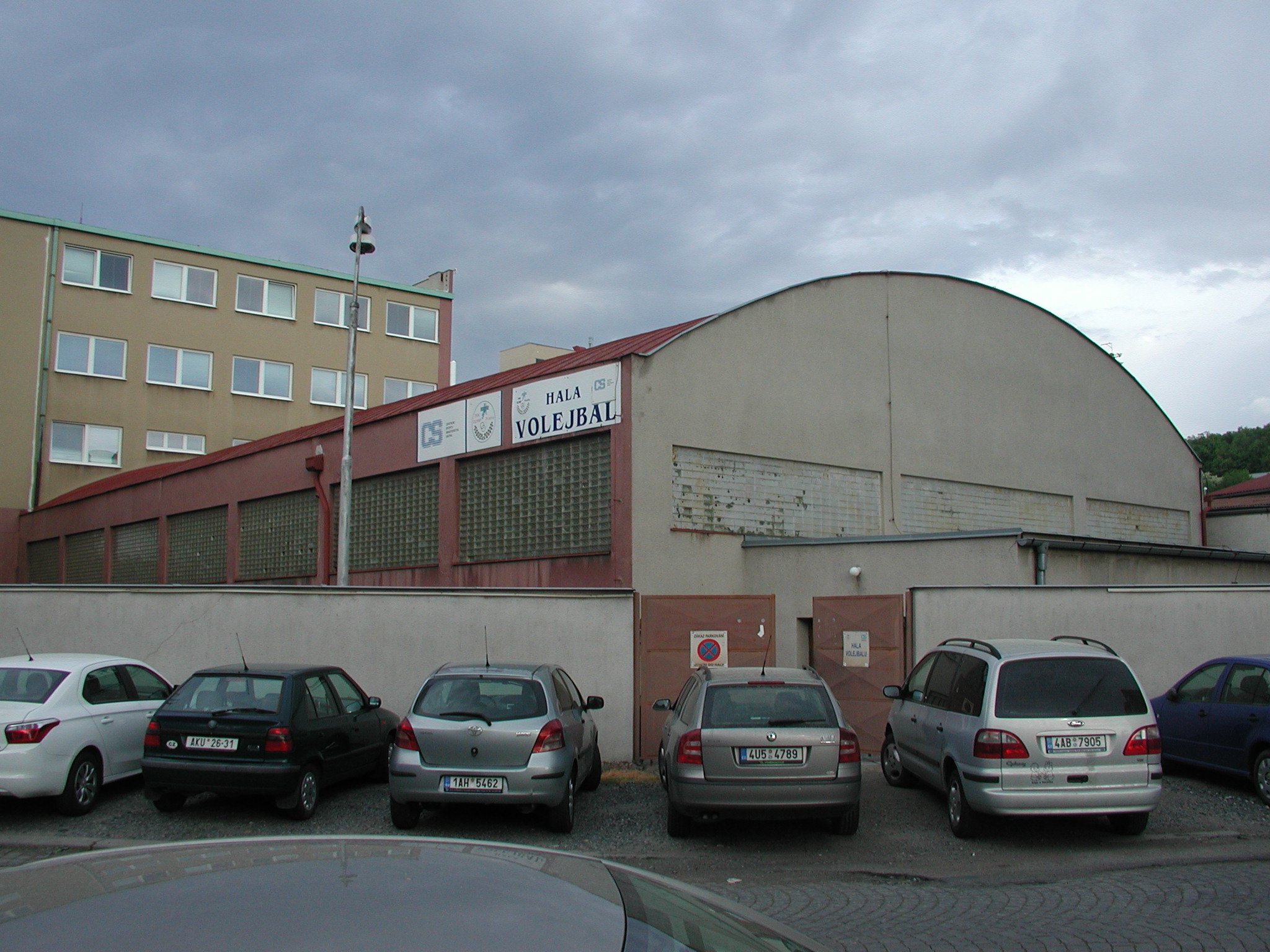 Praha - Vršovice, Přípotoční/Pod Soutratím - volejbalová hala